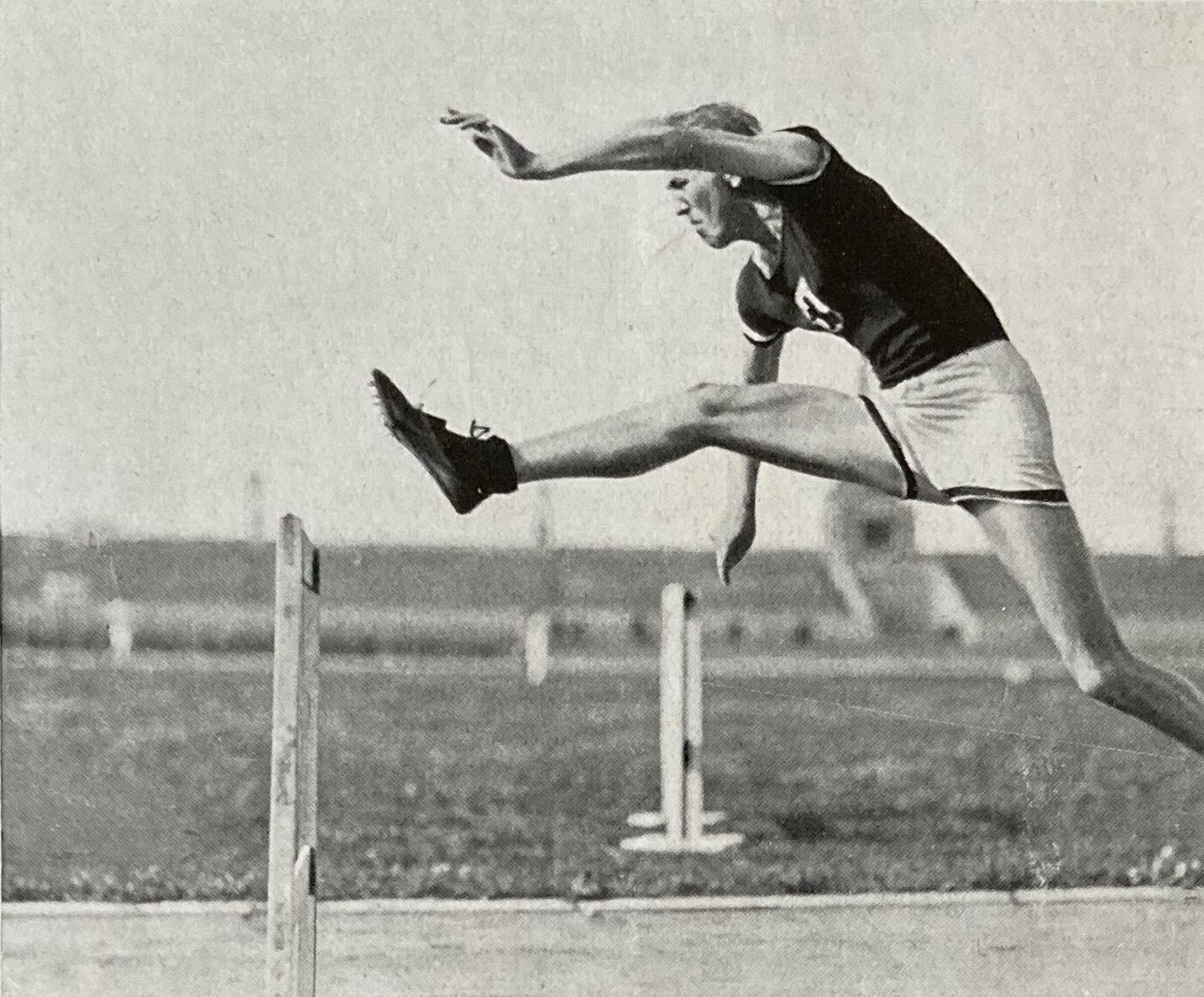 Zu sehen ist Reinhold Kasten beim Sprung über eine Hürde.